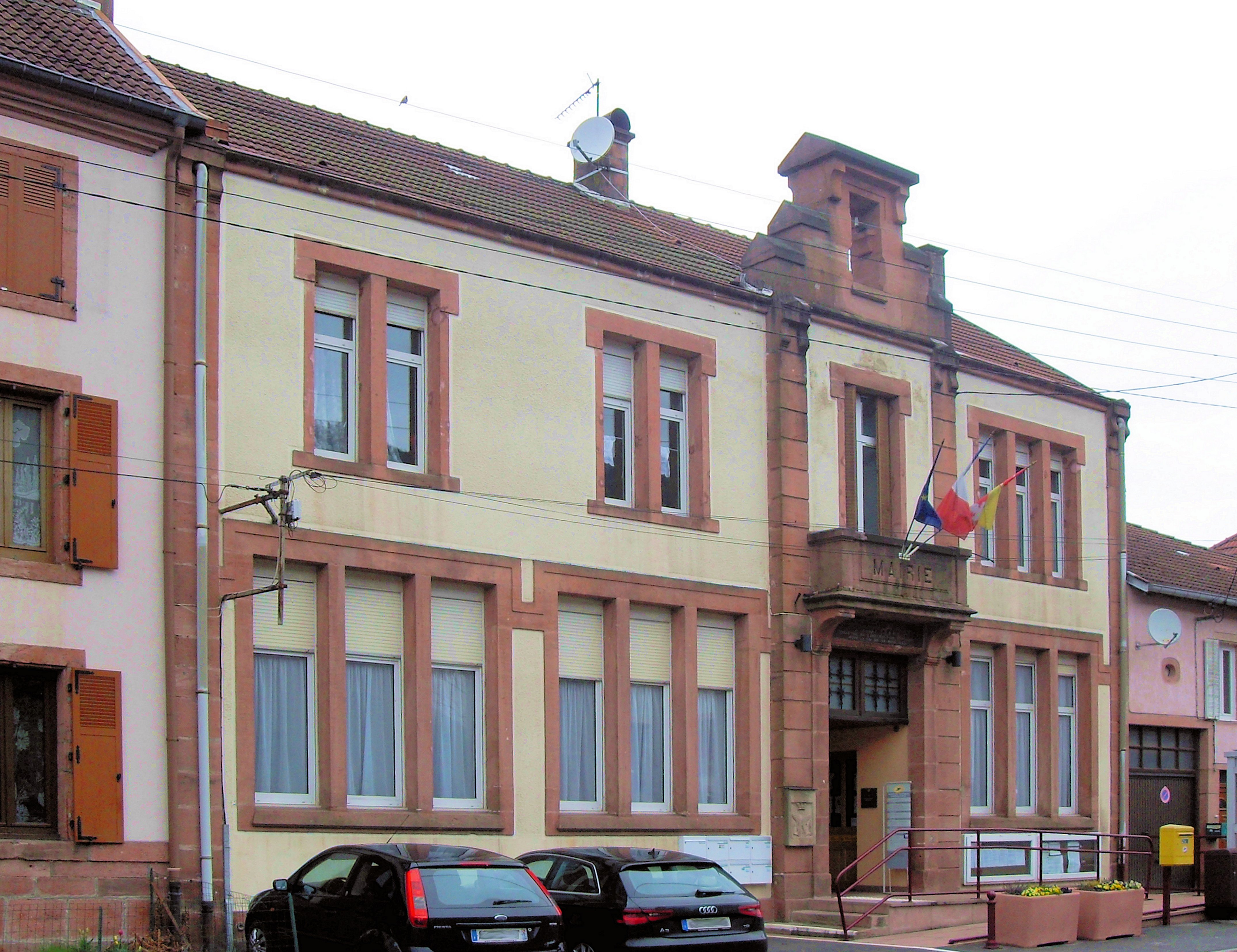 La mairie d'Allarmont, côté sud